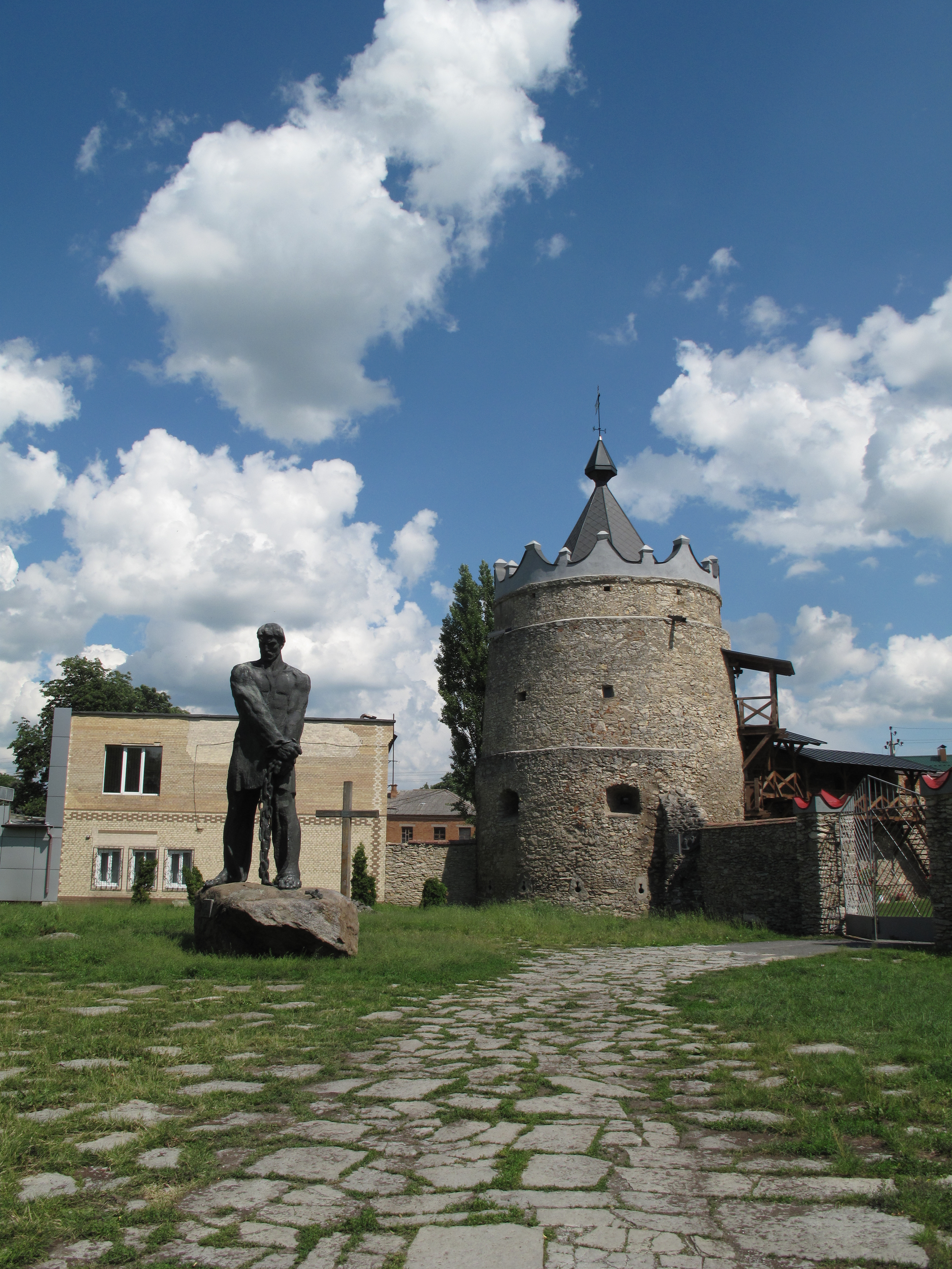 Вид на Летичівський замок